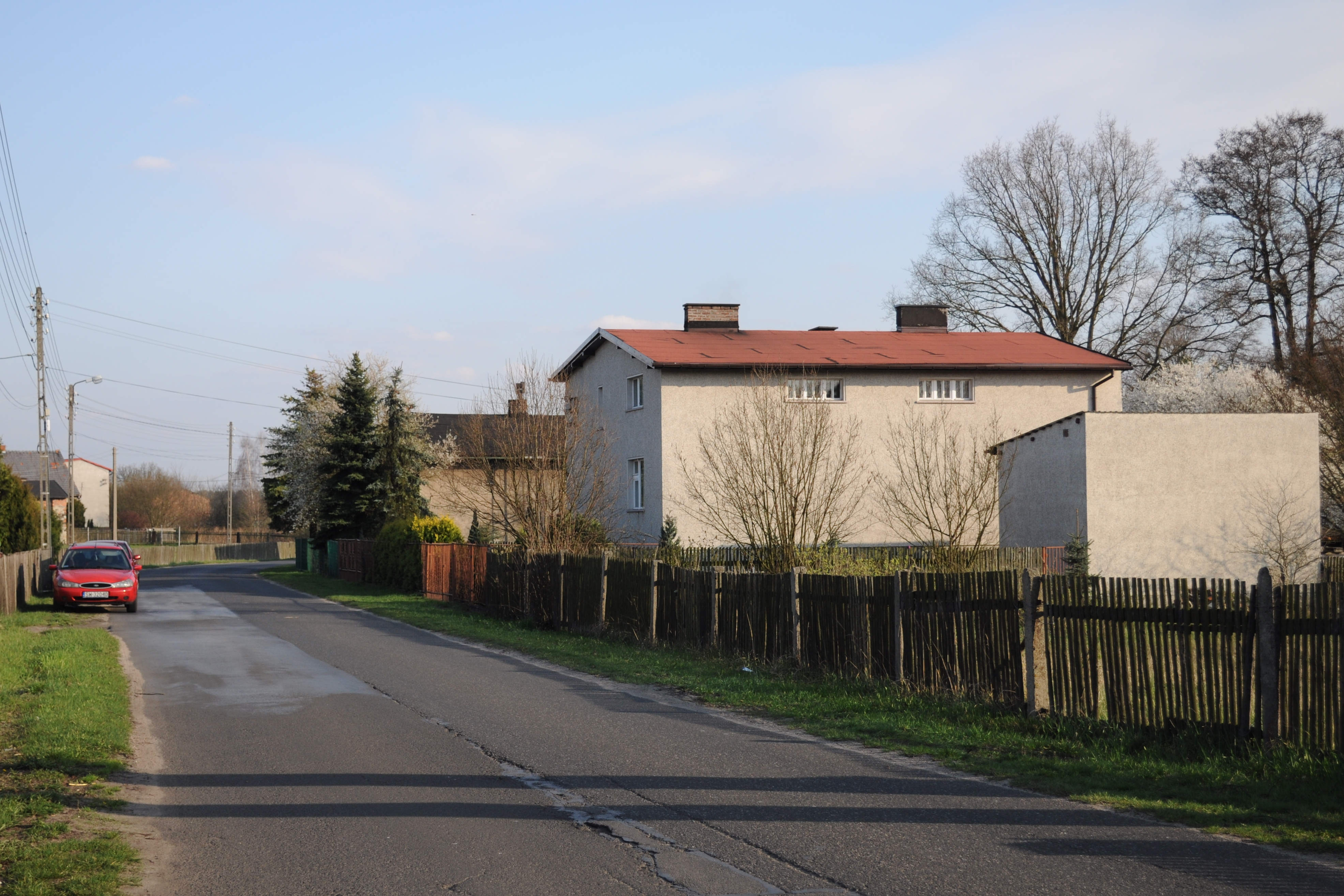 Hanusek.